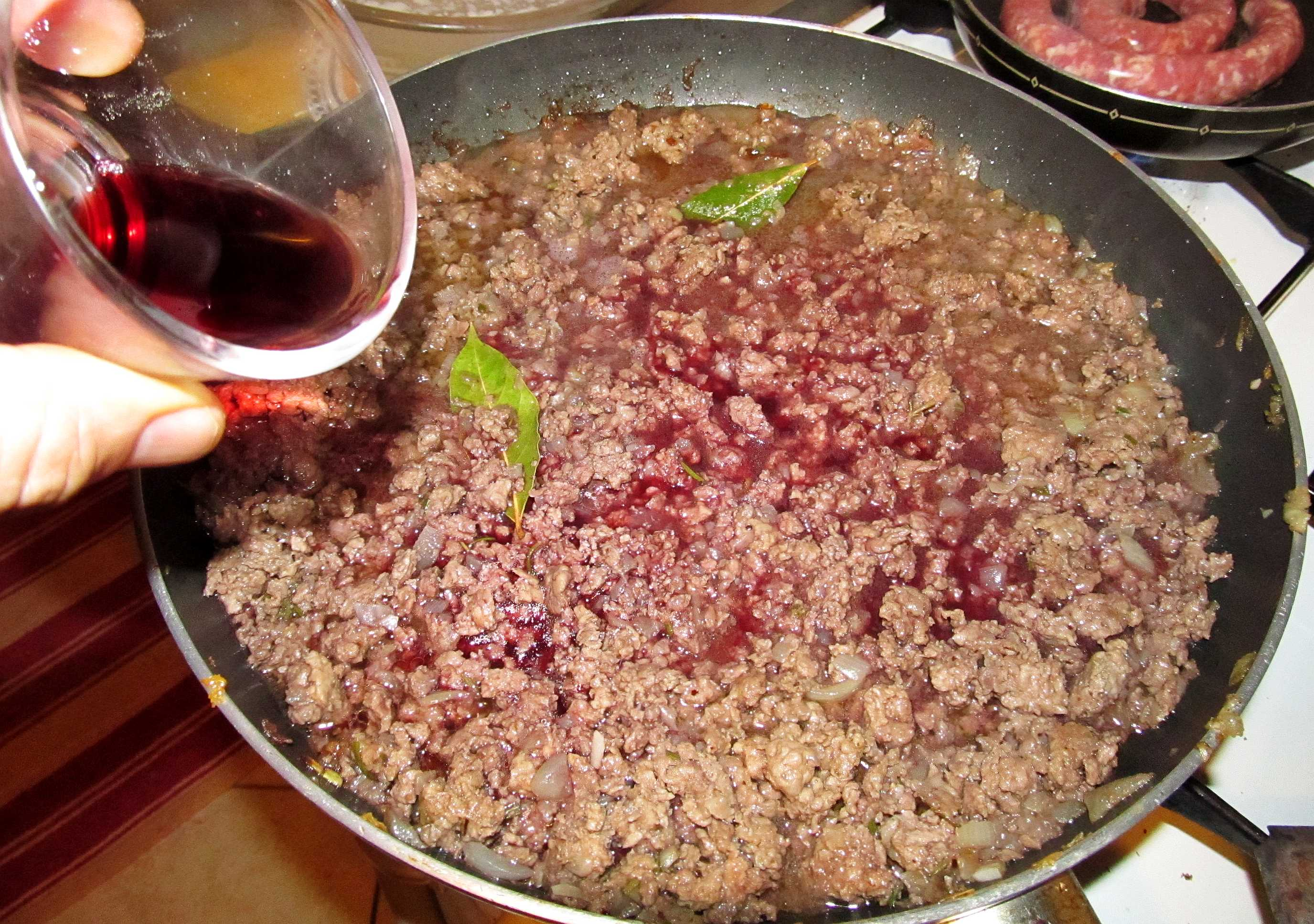 Preparazione del tapulòn: aggiunta del vino